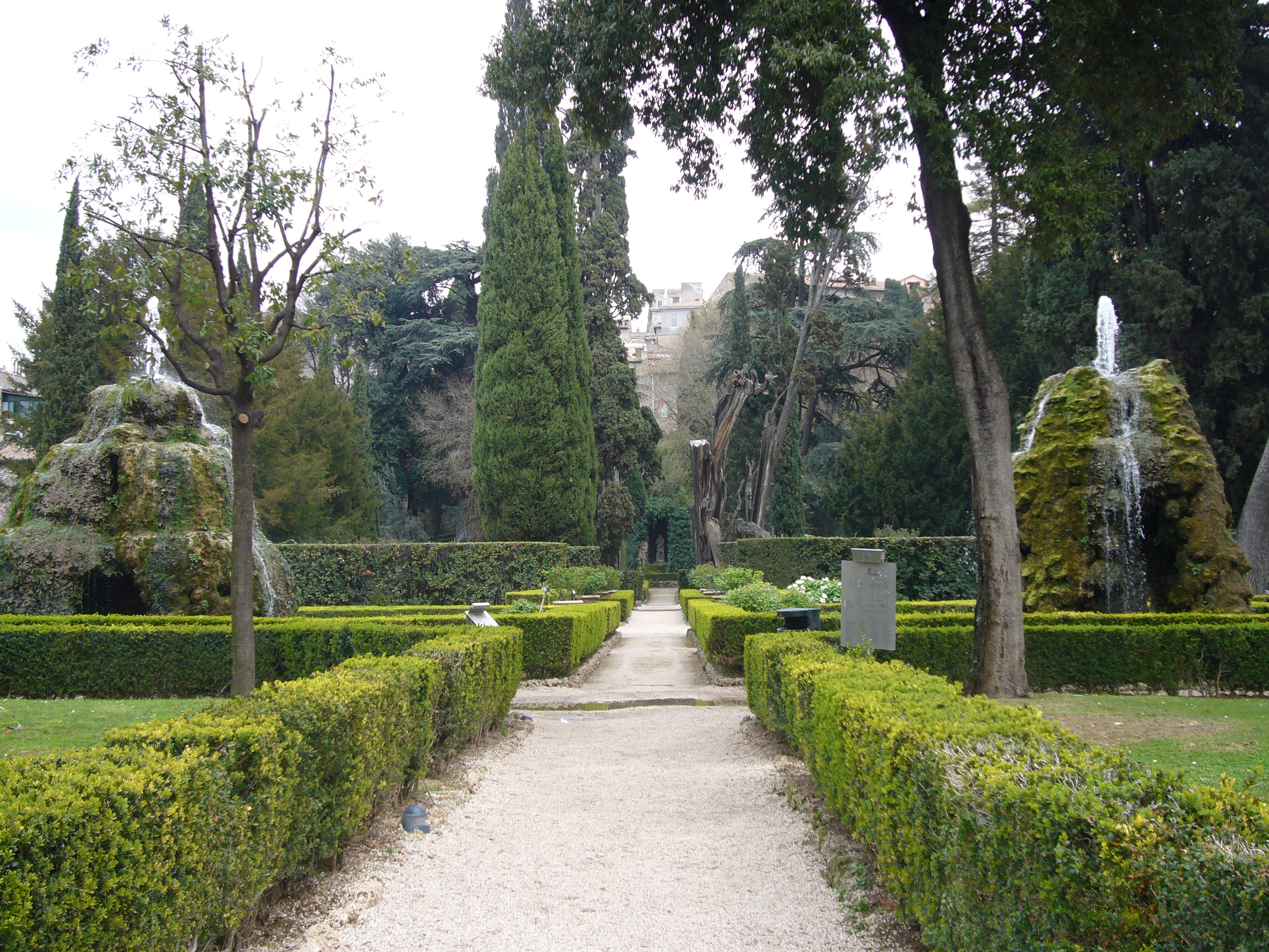 Tivoli, Villa d'Este:fontane rustiche (o delle Mete)